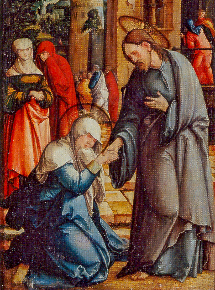 Der Wildensteiner Altar: Standflügel, links: Christi Abschied von seiner Mutter-Detail